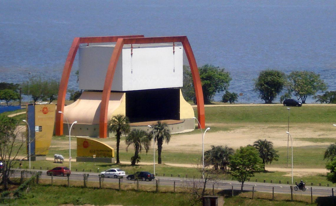 Anfiteatro Por-do-Sol